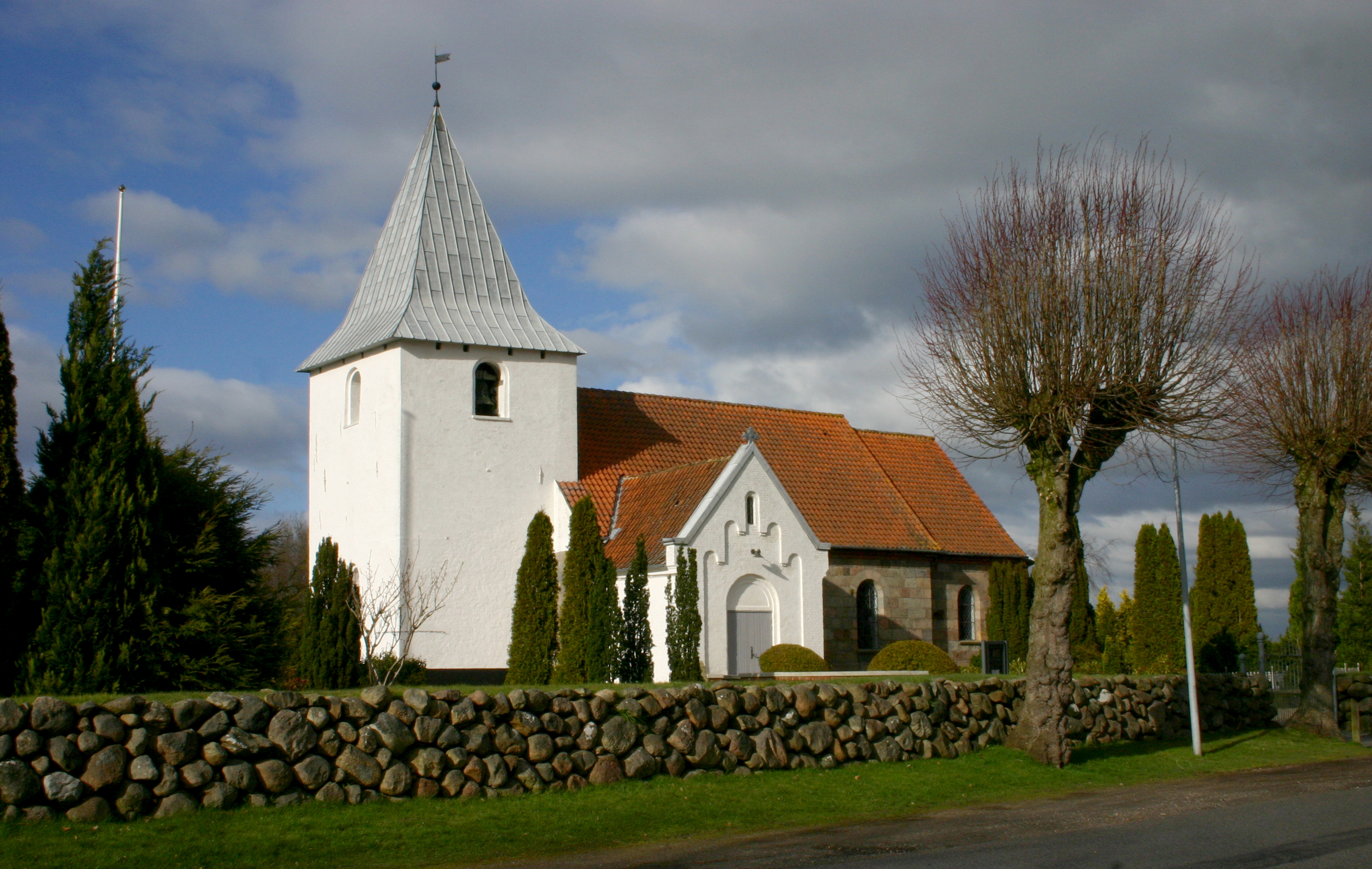 Bramdrup kirke is an old church in Bramdrupdam,Kolding,Denmark.Roman style.Build in year 1100-1200.